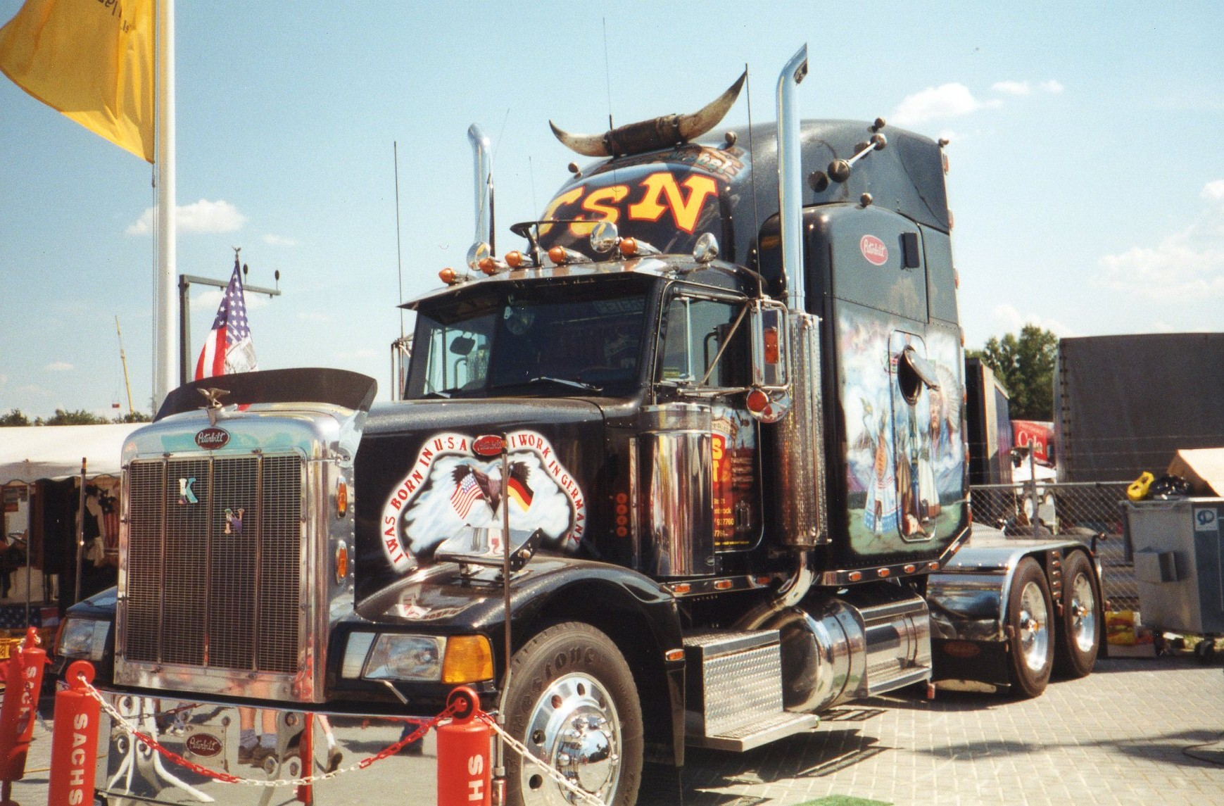 Peterbilt op een truckshow